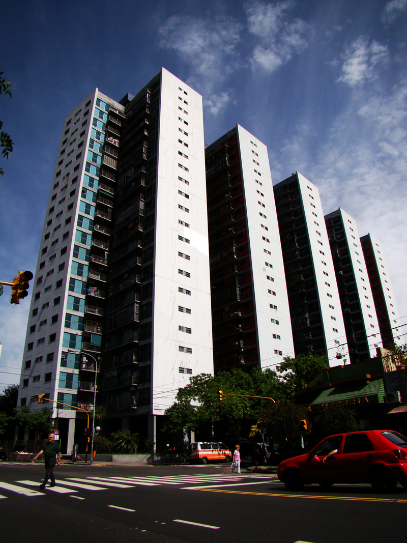 Torres de Matheu en el barrio de Parque Patricios, ciudad de Buenos Aires, Argentina. Toma realizada desde avenida Brasil casi esquina Matheu.